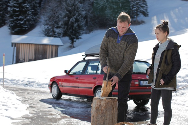 Szenenfoto aus dem Schweizer Kinofilm "Nichts passiert", links: Devid Striesow, rechts Annina Walt